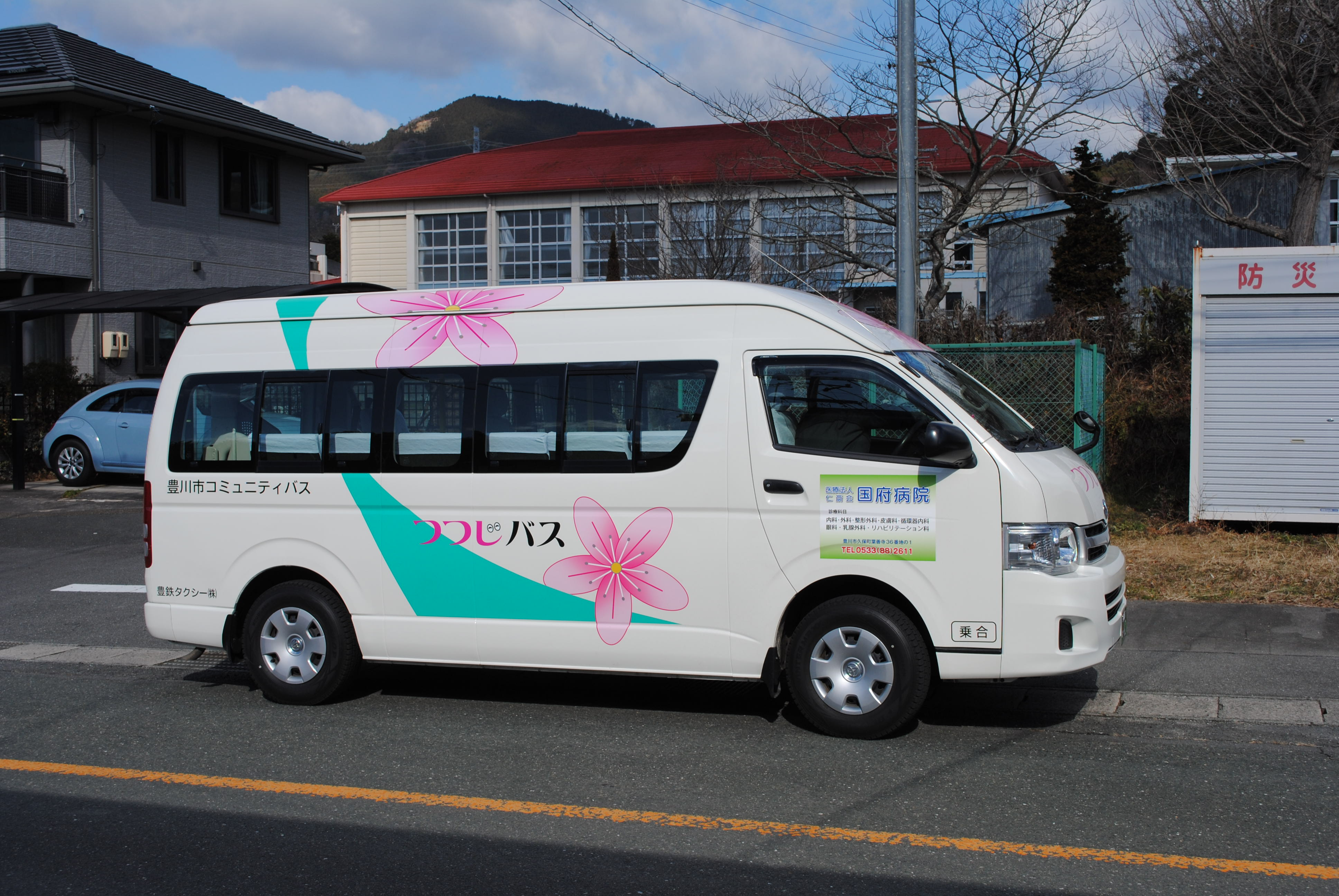 豊川市コミュニティバスの音羽地区路線を走る車両「つつじバス」。豊川市立萩小学校前にて